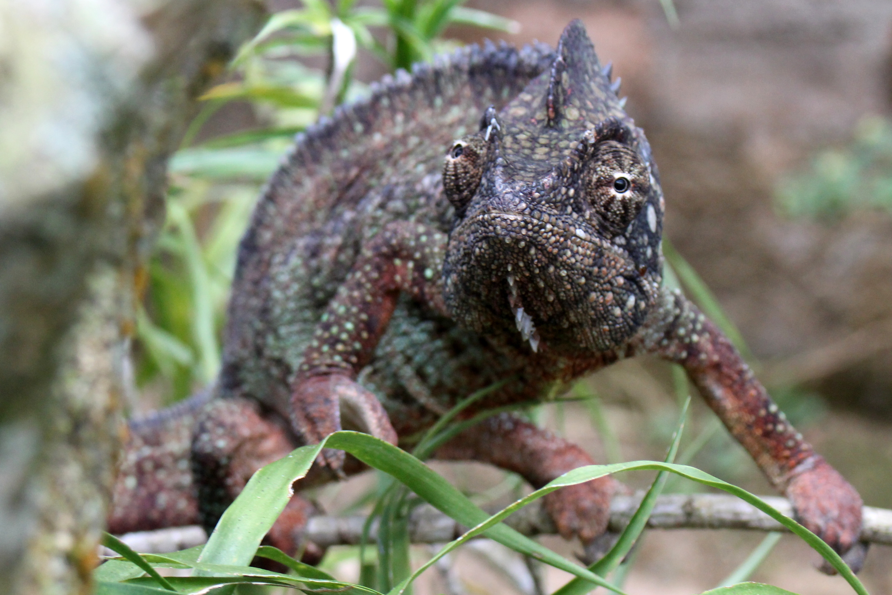 cameleon, peyrieras